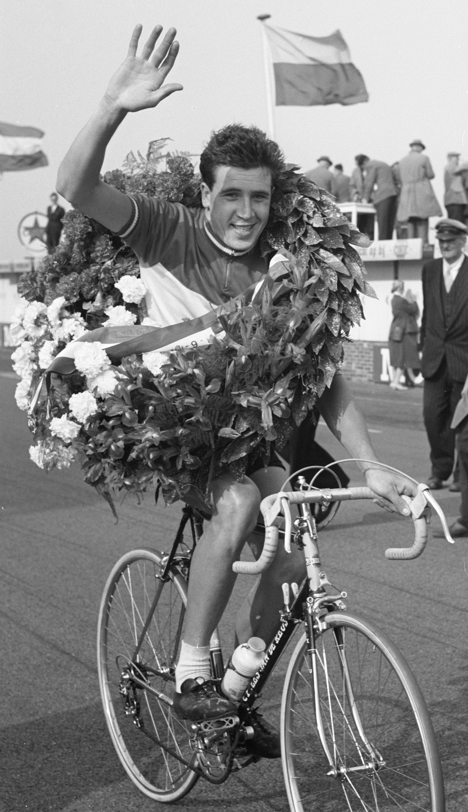 Kampioenschappen van Nederland voor amateurs op de weg. Winnaar Gerard Wesseling